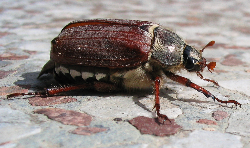 Beschreibung: Feldmaikäfer (Melolontha melolontha) / Weibchen Fotograf: Darkone, 8. Mai 2005